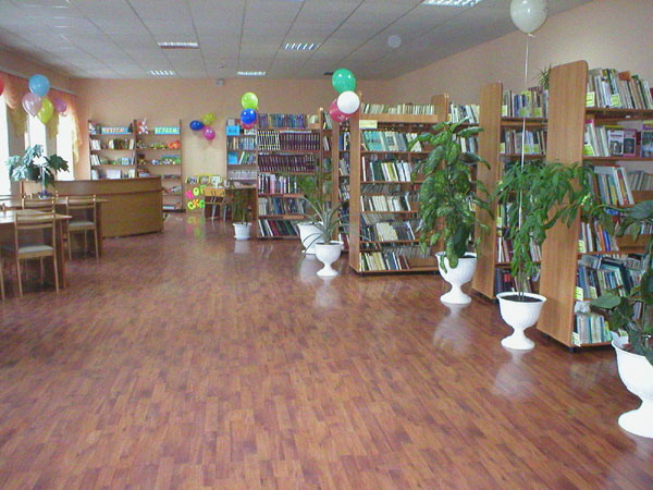 Сажинская библиотека